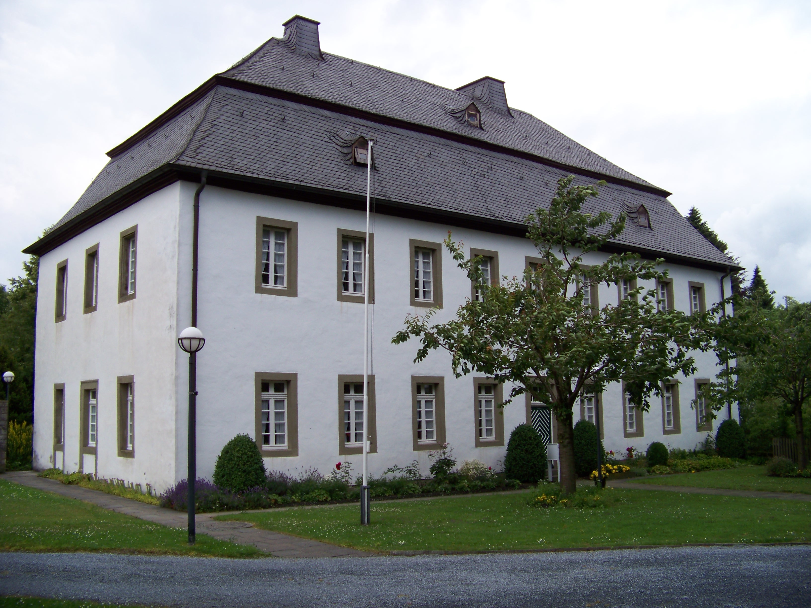 Deutschordenskommende Mülheim, Pfarrei, Warstein-Sichtigvor (Germany)